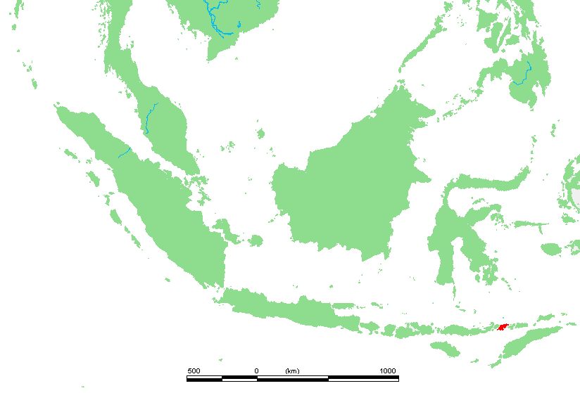 ID Tidore.PNG